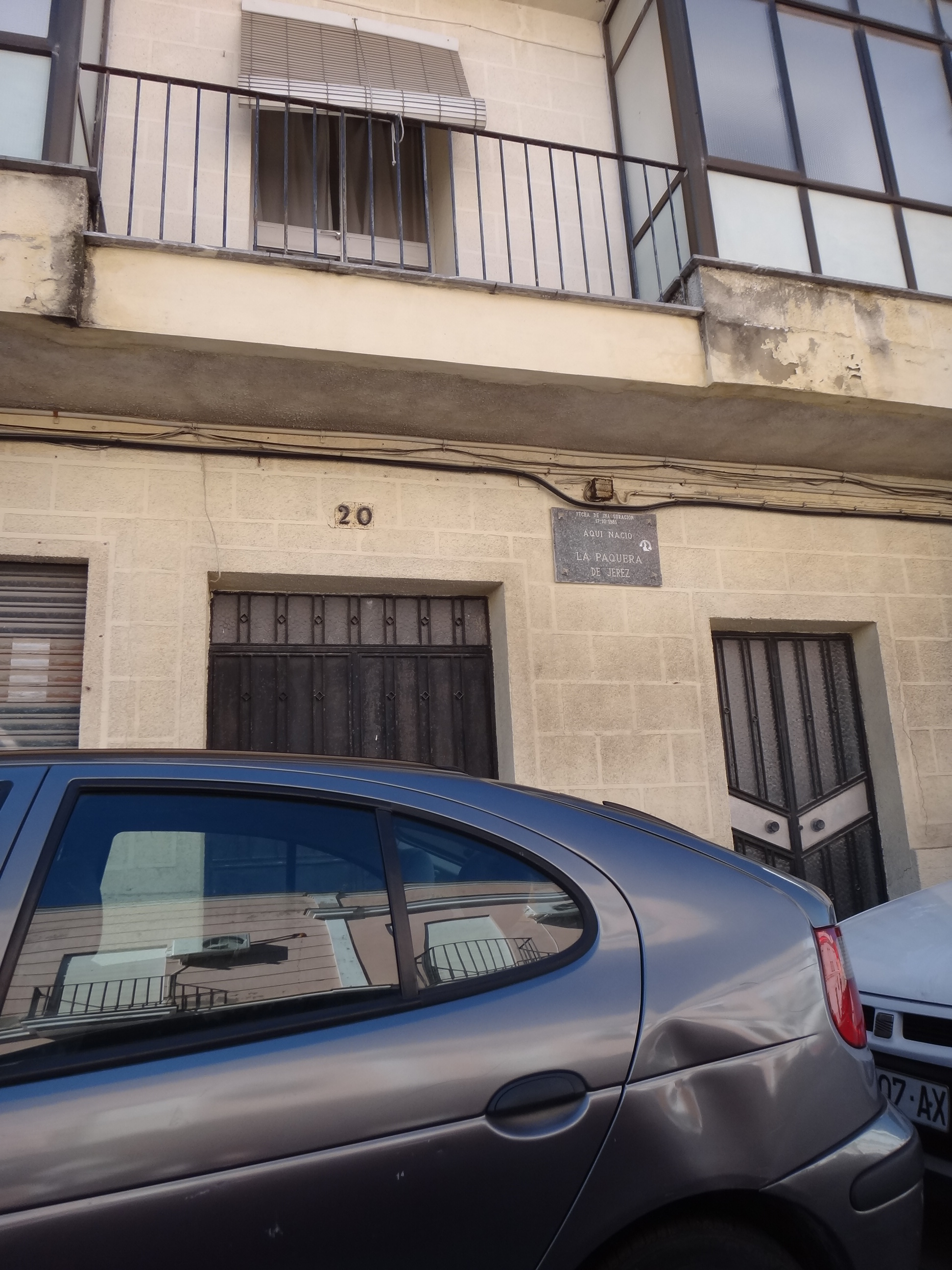 Casa donde nació la Paquera de Jerez, en Jerez de la Frontera (Andalucía, España)